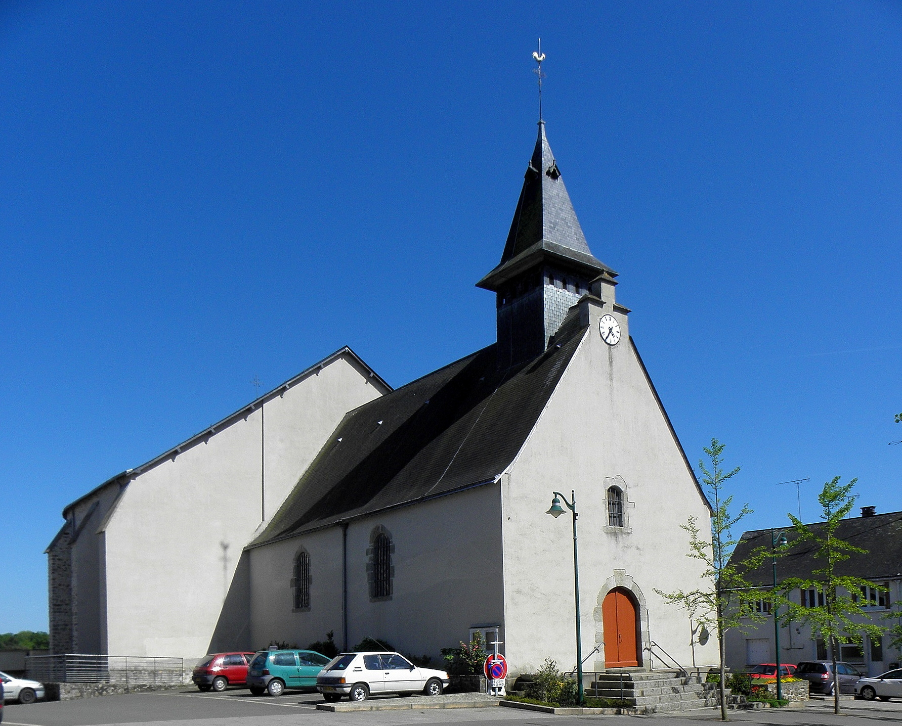 Église Saint-Jean-Baptiste de Saint-Jean-sur-Mayenne (53).